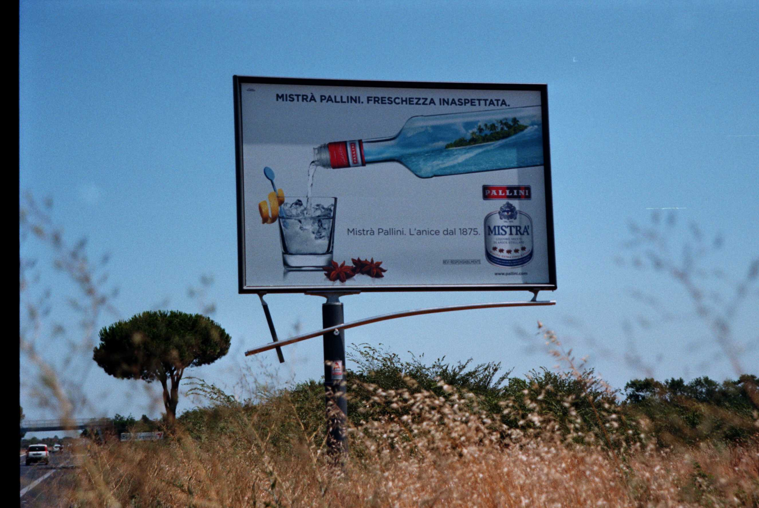 esempio di un cartellone pubblicitario